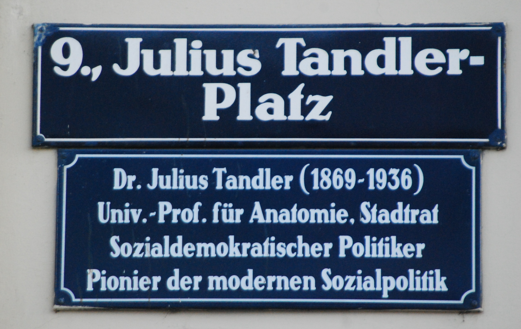 Straßentafel mit Zusatztafel am Julius-Tandler-Platz in Wien-Alsergrund.